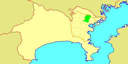 Map of Kōhoku-ku, Yokohama, Kanagawa-prefecture, Japan